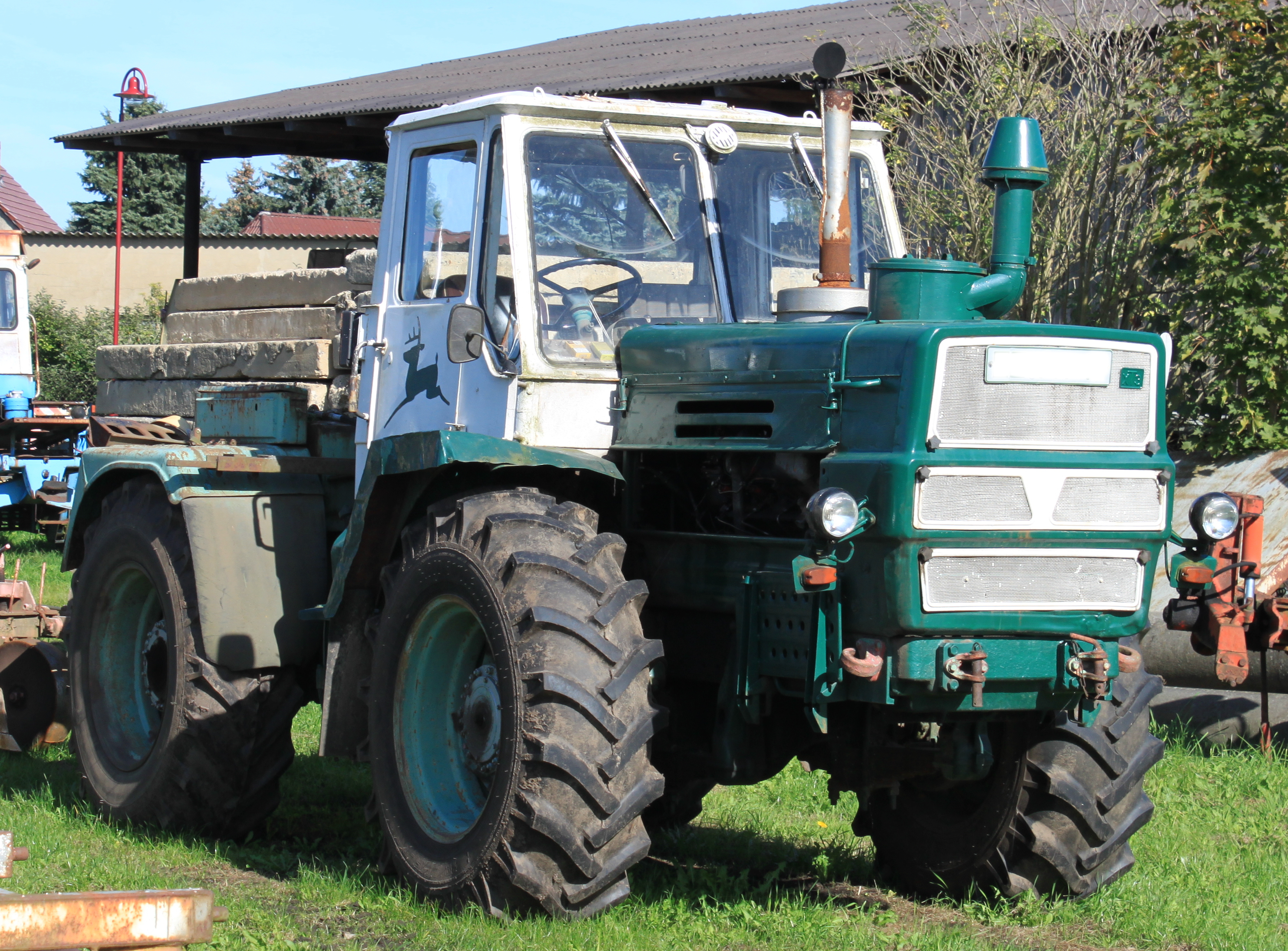 T-150 K